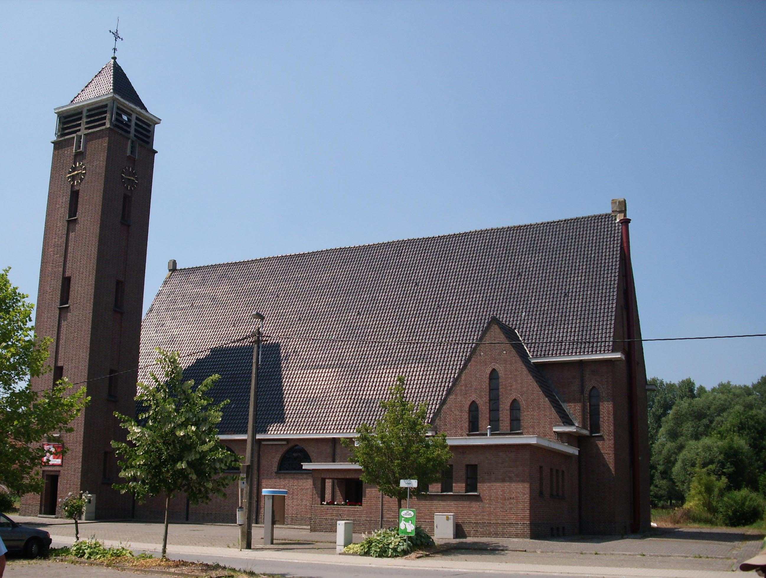 Sint-Antonius van Paduakerk van de wijk Lebeke - Outer - Ninove - Oost-Vlaanderen - Vlaanderen - België